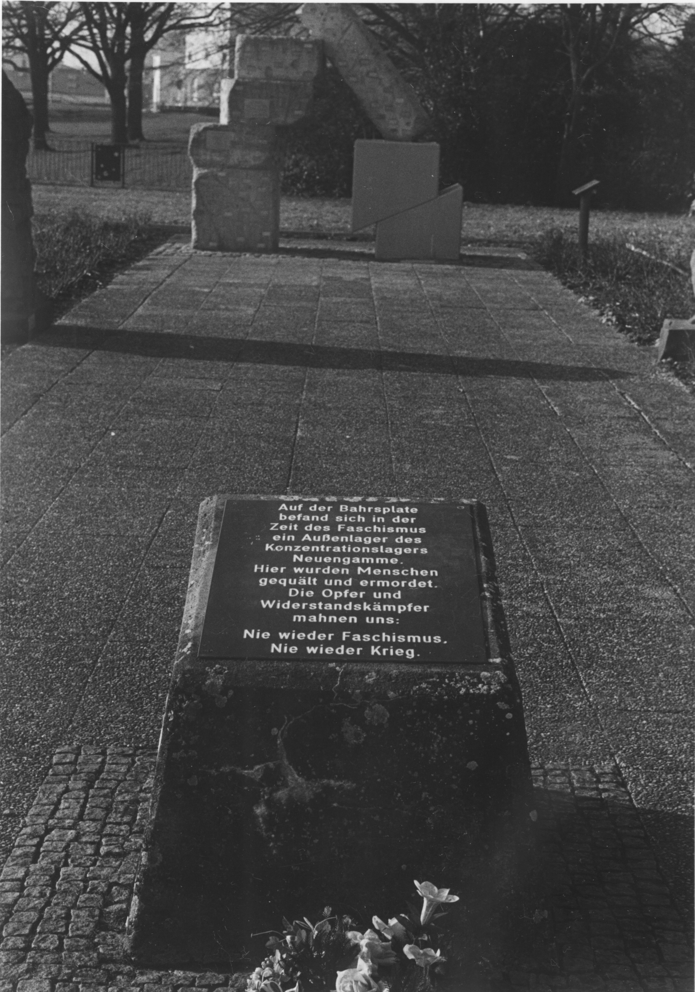 Blick auf die Gedenkanlage Bahrsplate Bremen-Blumenthal